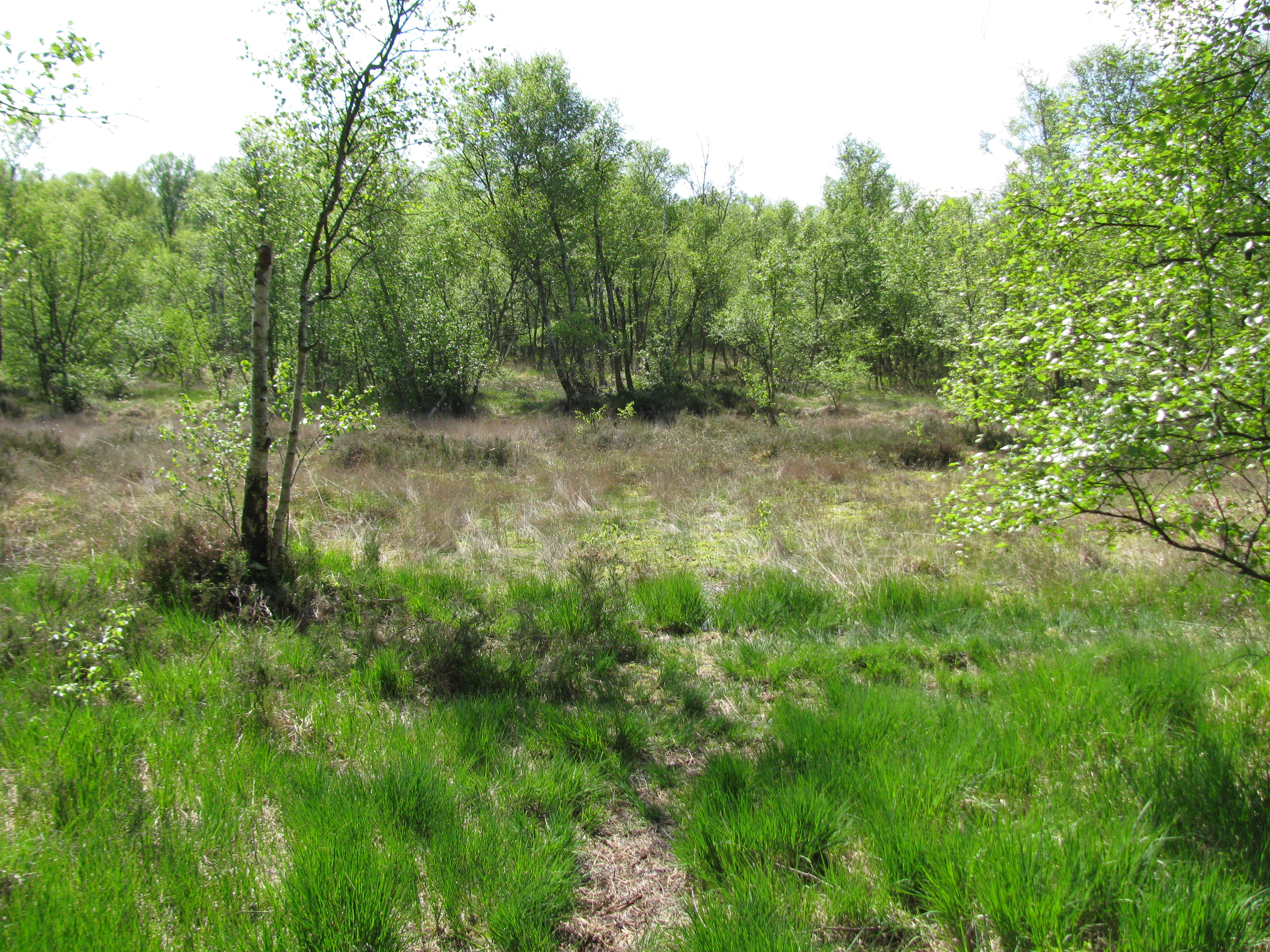 Moorfläche im Ohmoor (FFH-Gebiet) bei Garstedt